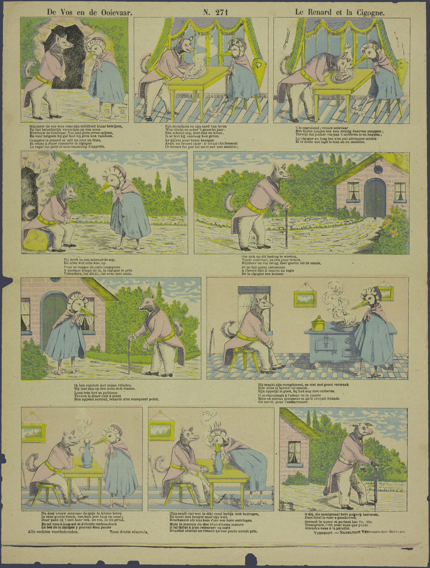 Centsprent met een litho met het verhaal van mijnheer de vos die mevrouw de ooievaar een plat bord soep voorzet, en de ooievaar die hem dat betaald zet met het serveren van haar spijs in een lange smalle fles. Met twee of drieregelige rijmende onderschriften in Nederlands en Frans.